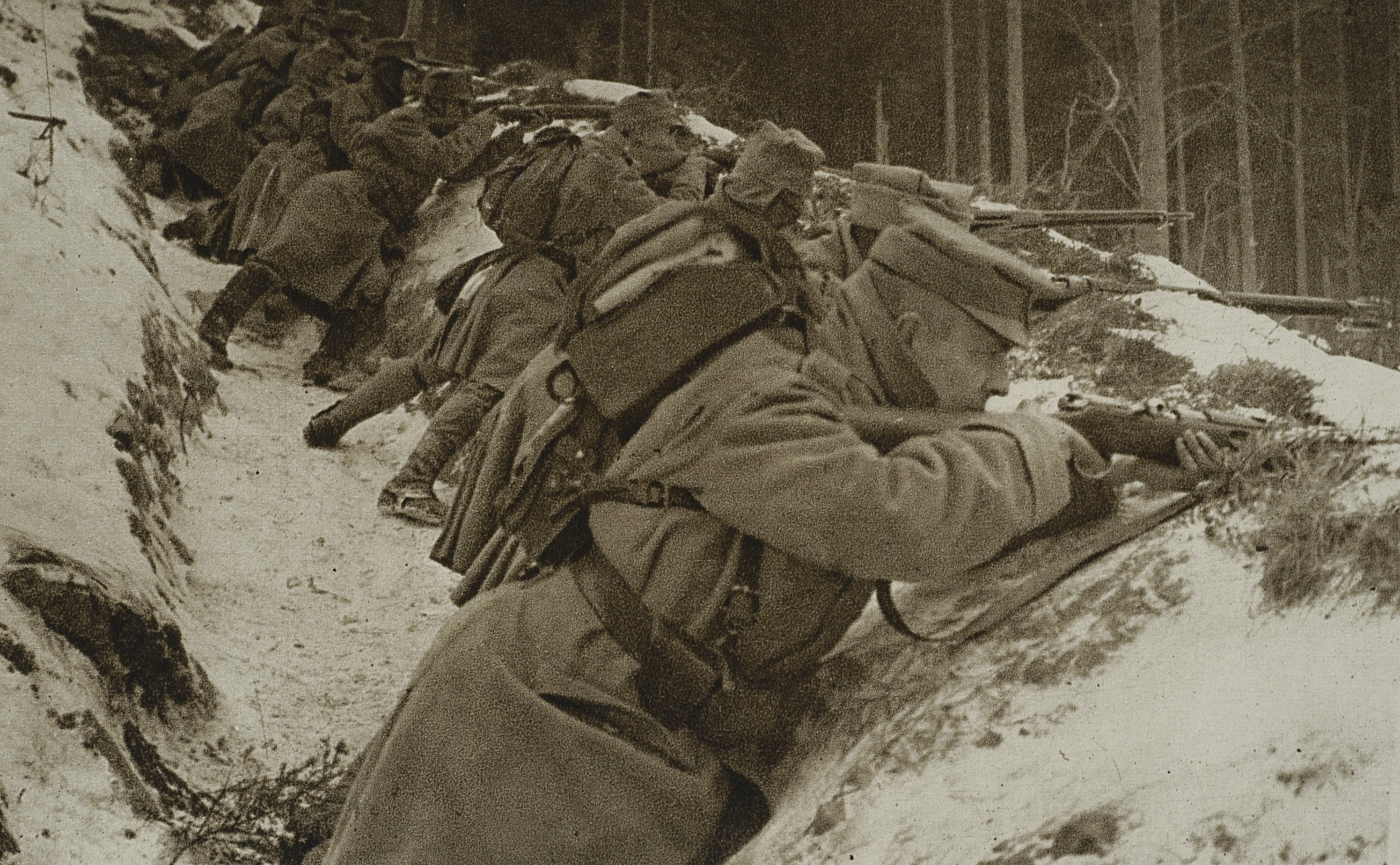 II Brygada Legionów Polskich - żołnierze w rowach strzeleckich.